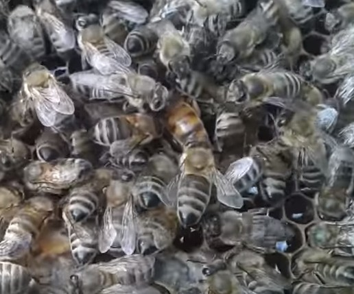 Фото Укаїнська степова порода бджіл